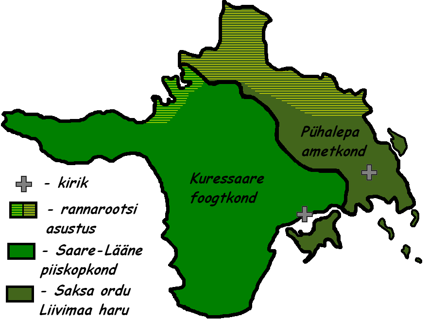 Hiiumaa haldusjaotus keskajal koos ligikaudse hiiurootsi asustusega